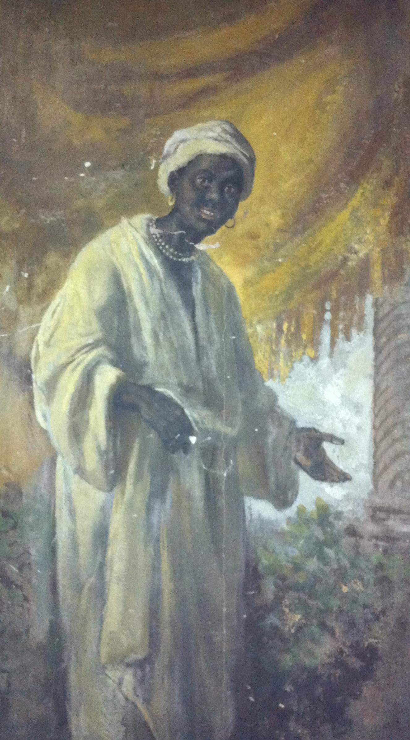 Personale di servizio accoglie il visitatore sulla scalinata principale